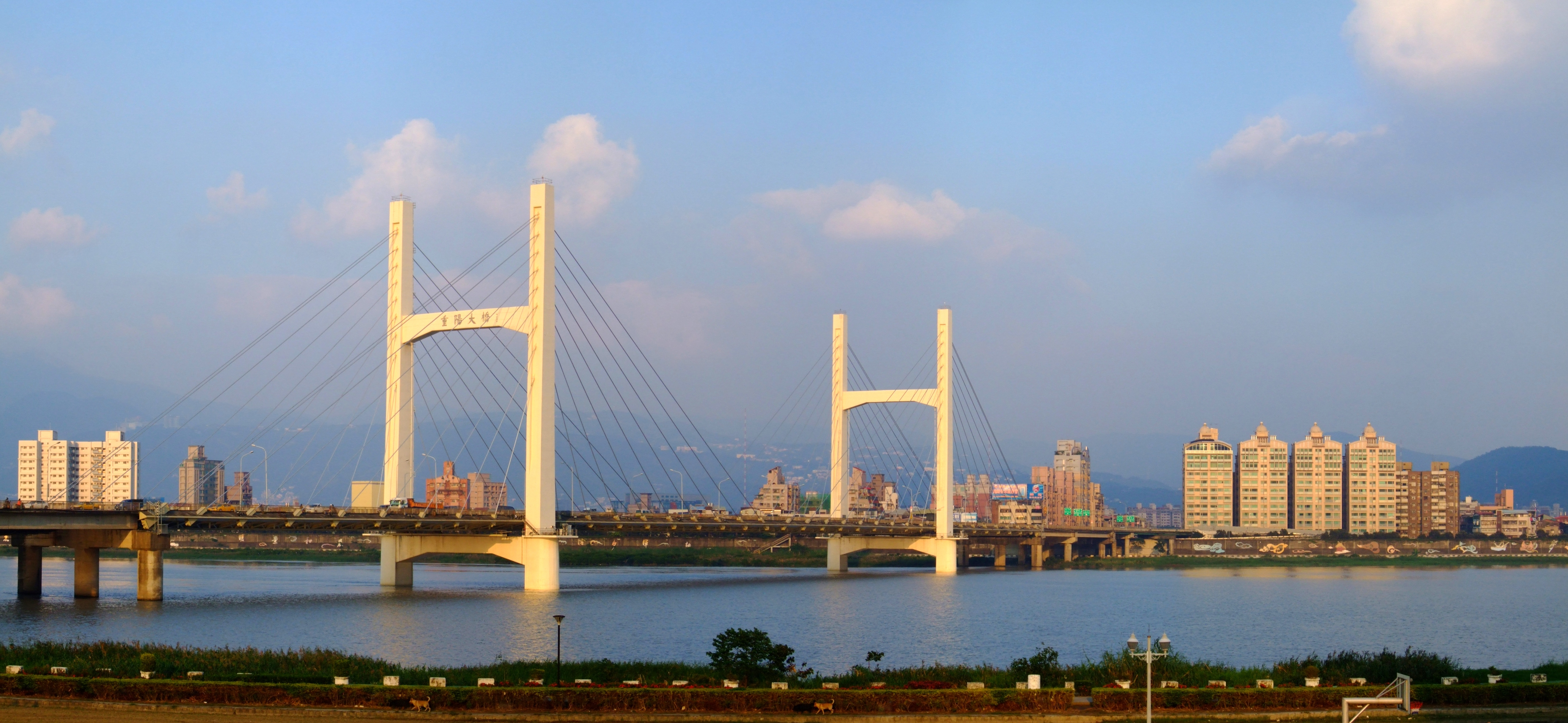 從三重市拍攝的重陽橋全景。